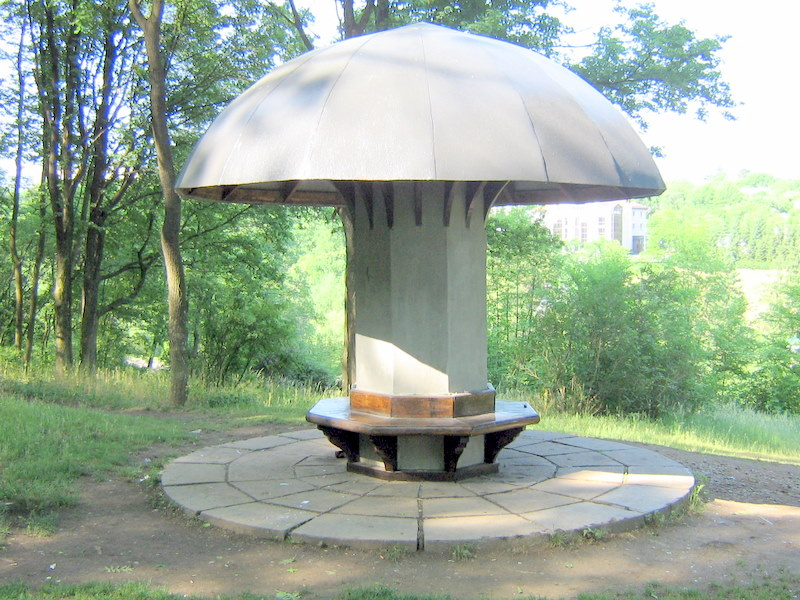 Беседка «Грибок».